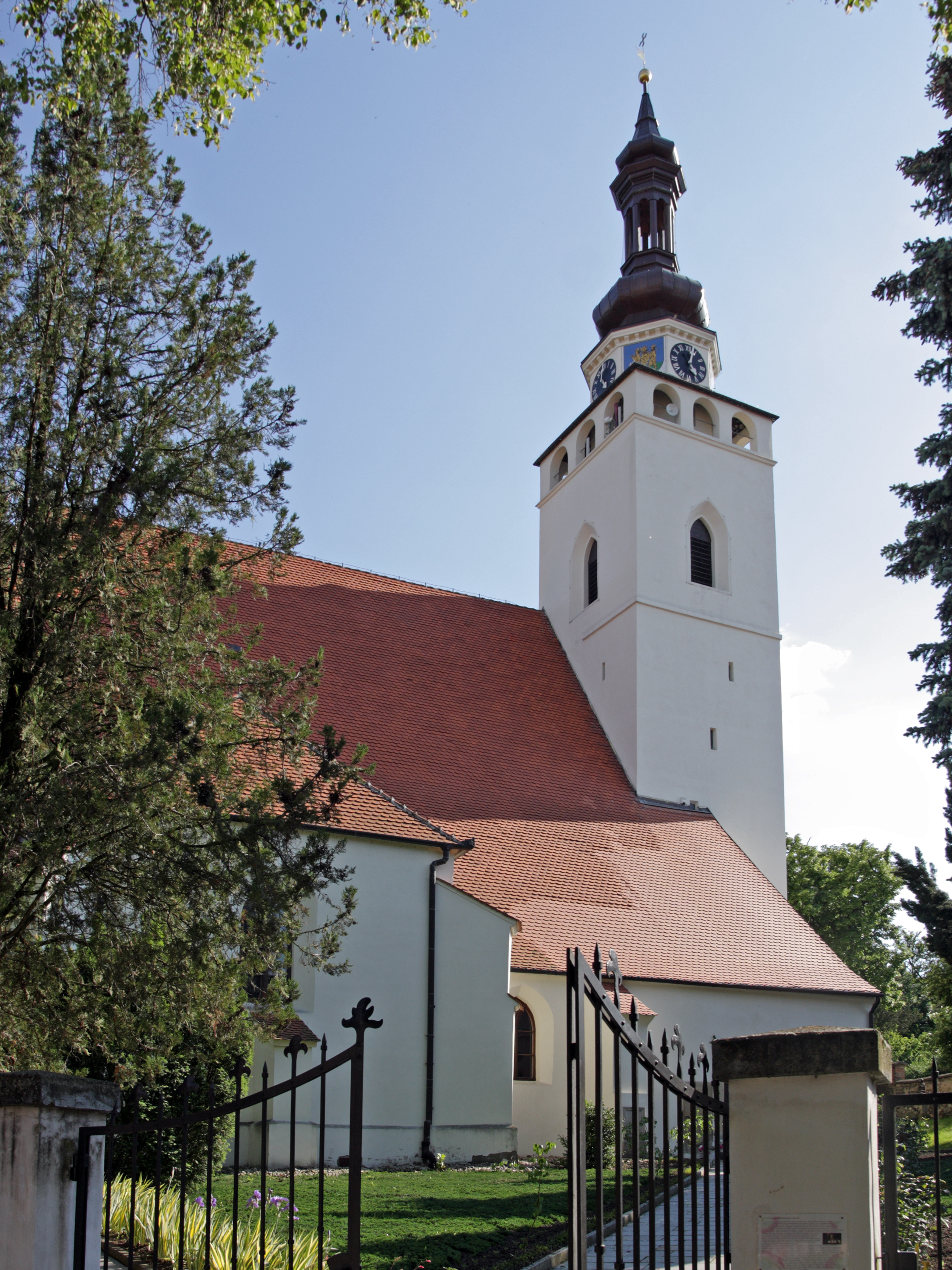 Blučina, kostel Nanebevzetí Panny Marie.